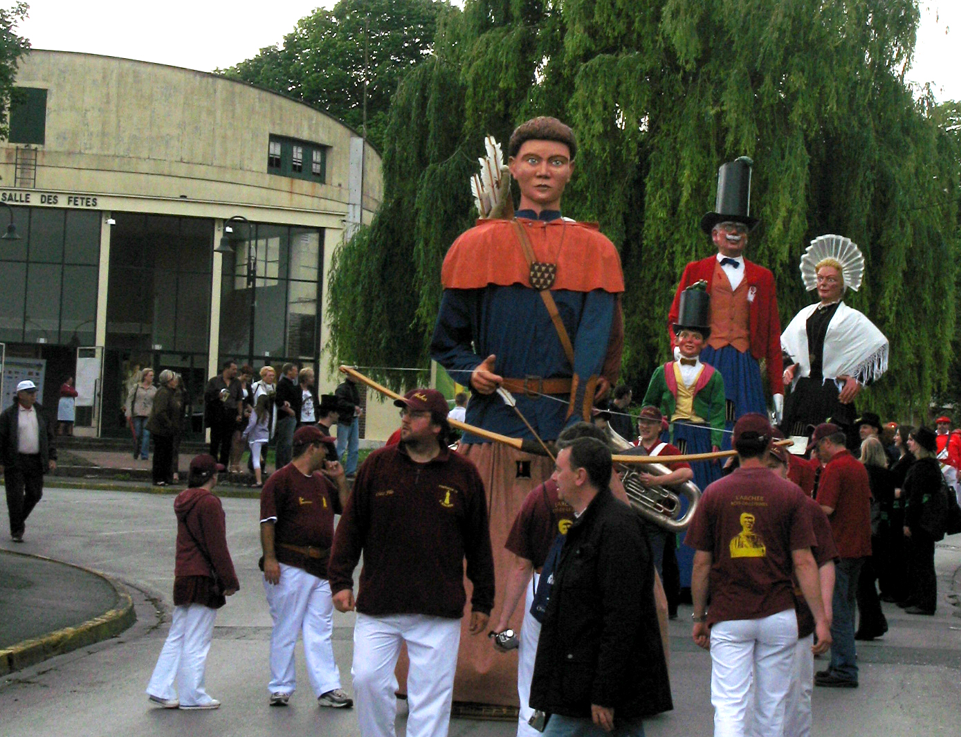 Ham (Somme, France) - Animation festive au centre-ville, un dimanche de printemps. Des Géants de procession descendant la rue du Château rejoignent la rue de Noyon, en passant devant la Salle des Fêtes. On reconnaît : "L'Archer de Bois-de-Lessines", au premier plan "Anatole", le plus petit des deux qui portent un chapeau à haut-de-forme, avec sa verte verte au revers rouge "Grand-père Guernouillard", avec son haut-de-forme et sa veste rouge "Zabelle", avec son châle blanc et sa coiffure de dentelle